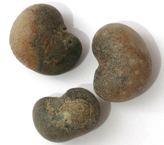 Samen vom Affenbrotbaum Länge der Samen ca. 10 mm